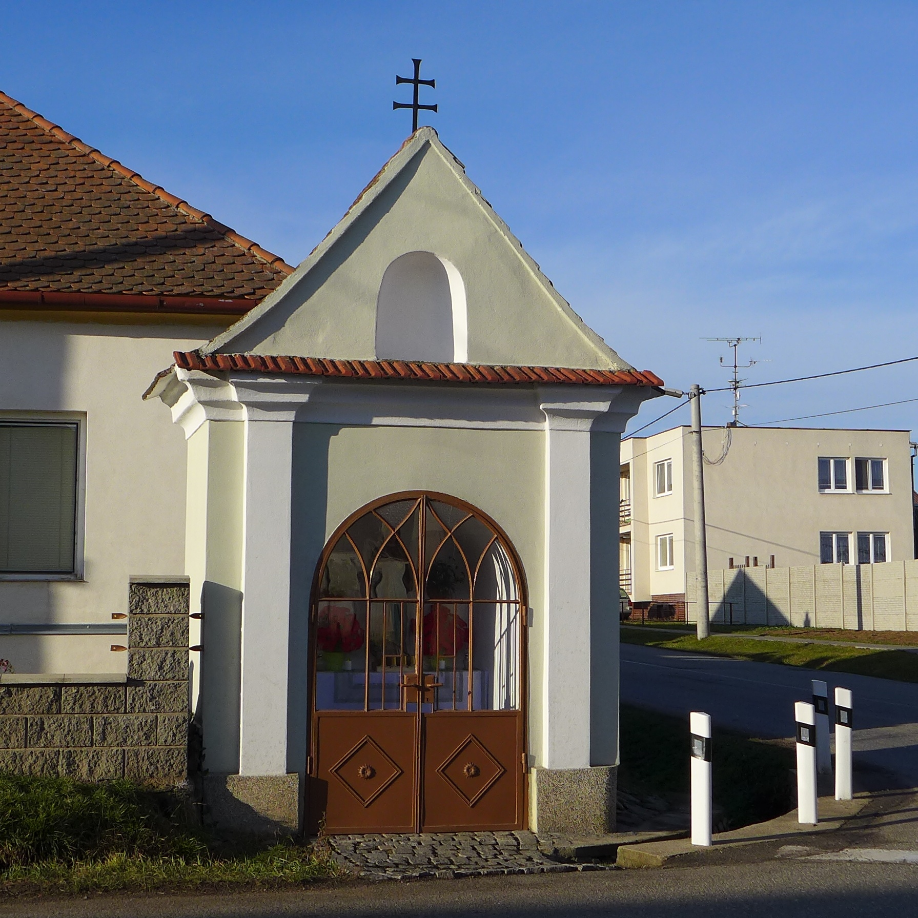 Kaplička, při křižovatce v obci, Dobelice.